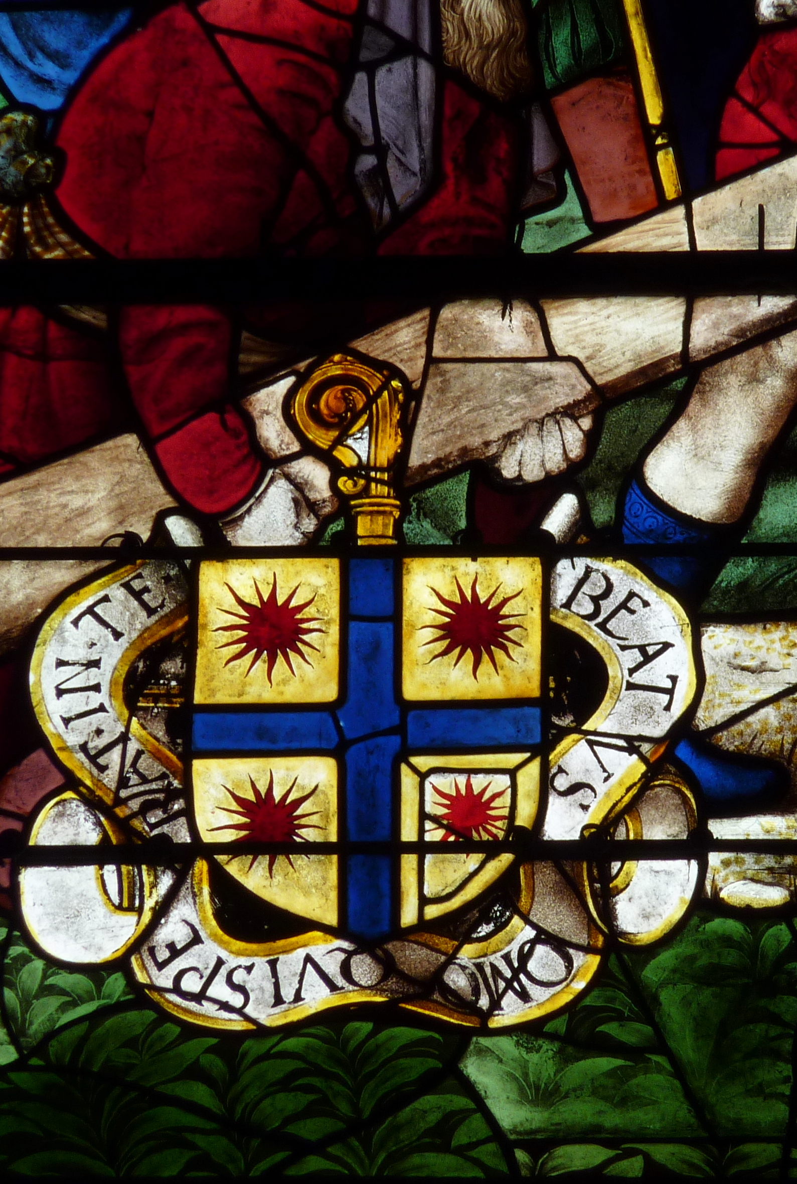 Katholische Pfarrkirche Saint-Pierre in Limours, einer Gemeinde im Département Essonne (Île de France), Chorfenster, um 1520, Darstellung (Ausschnitt der Kreuztragungsszene): Wappen